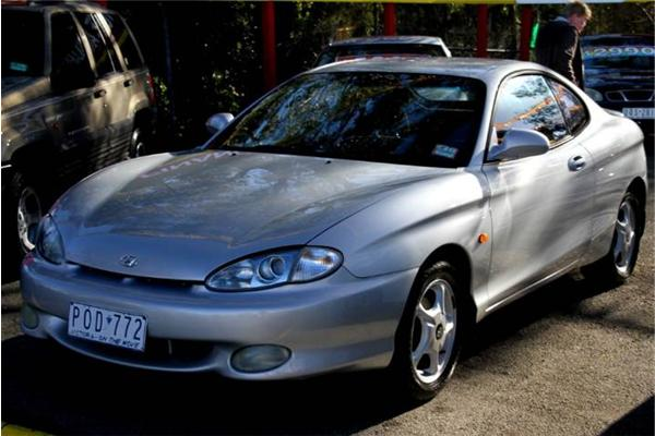 Coupe 1